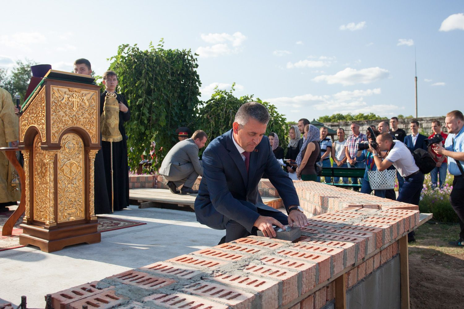 Президент Приднестровья Вадим Красносельский на закладке часовни в честь Святых Царственных мучеников